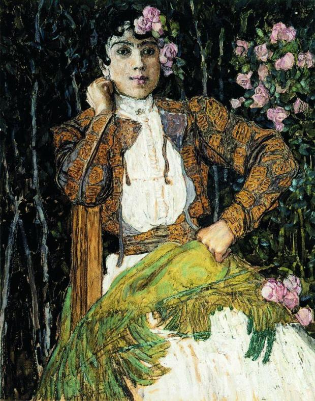 Испанка В Зеленом. 1906-1907